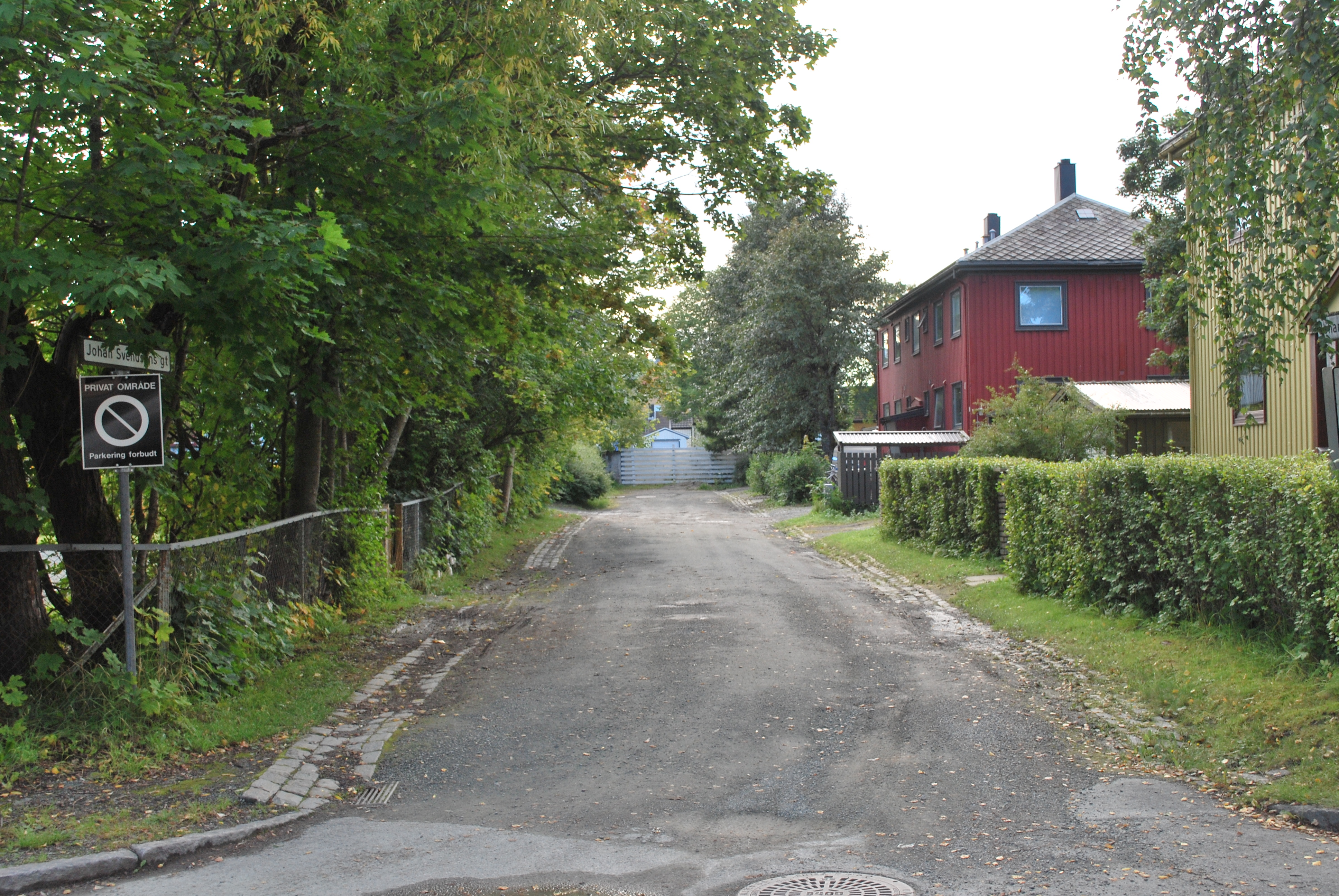 Johan Svendsens gate på Øya i Trondheim.